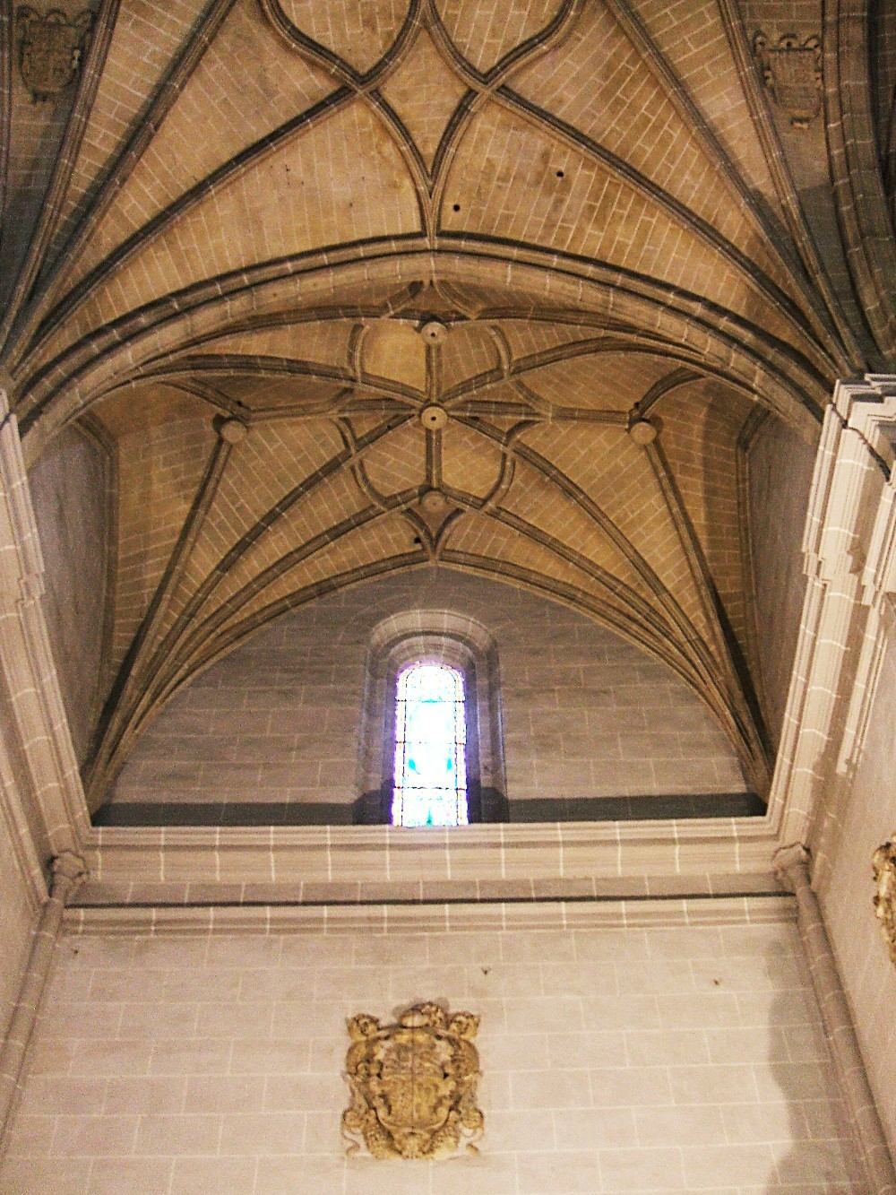 Bóveda del brazo septentrional del transepto de la Iglesia del Convento/Colegio de los Sagrados Corazones, Miranda de Ebro (Burgos, España/Spain)